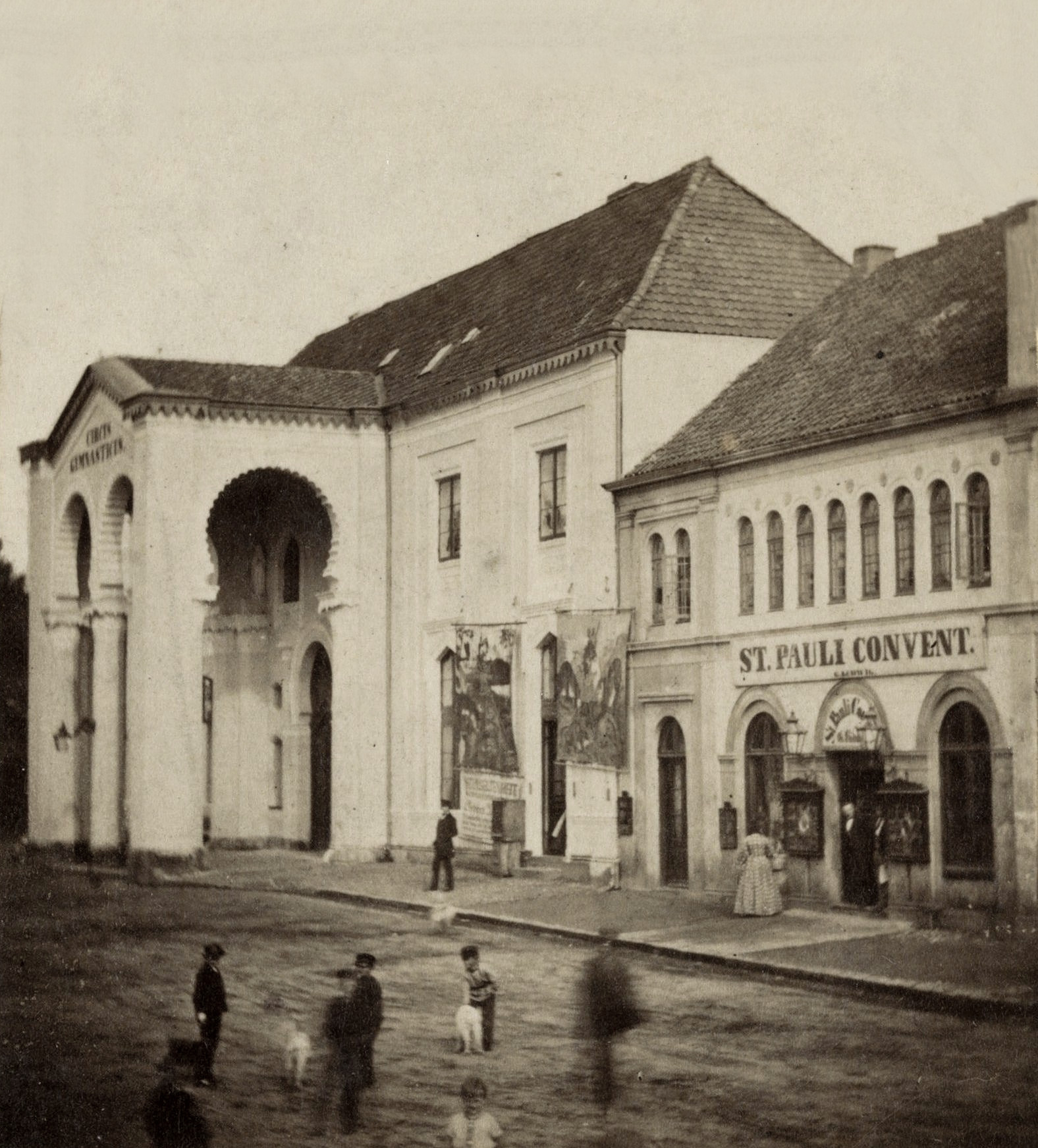 IdentificatieTitel(s): Exterieur van het Circus Gymnasticus te HamburgObjecttype: stereofoto Objectnummer: RP-F-F05949Opschriften / Merken: naam, recto, gepreegd: ‘A. Krüss Hamburg’opschrift, verso, handgeschreven: ‘Hamburg Circus Gymnasticus & St Pauli Convent’nummer, verso, handgeschreven: ‘47’VervaardigingVervaardiger: fotograaf: A. Krüss (vermeld op object)Plaats vervaardiging: HamburgDatering: ca. 1855 - ca. 1880Materiaal: karton fotopapier Techniek: albuminedrukAfmetingen: secundaire drager: h 85 mm × b 170 mmOnderwerpWat: theatre (building)abbey, monastery, convent ~ Roman Catholic churchfaçade (of house or building)Waar: HamburgVerwerving en rechtenVerwerving: overdracht van beheer 1994Copyright: Publiek domein